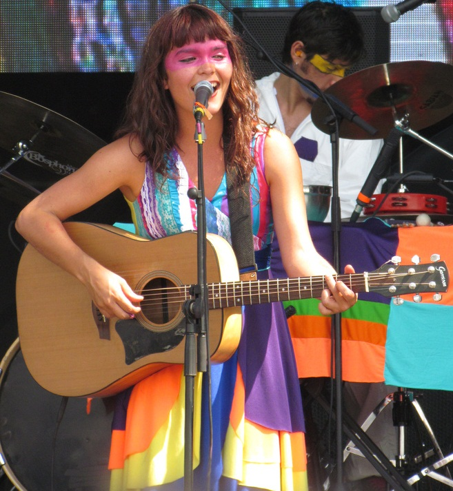 Cami Moreno